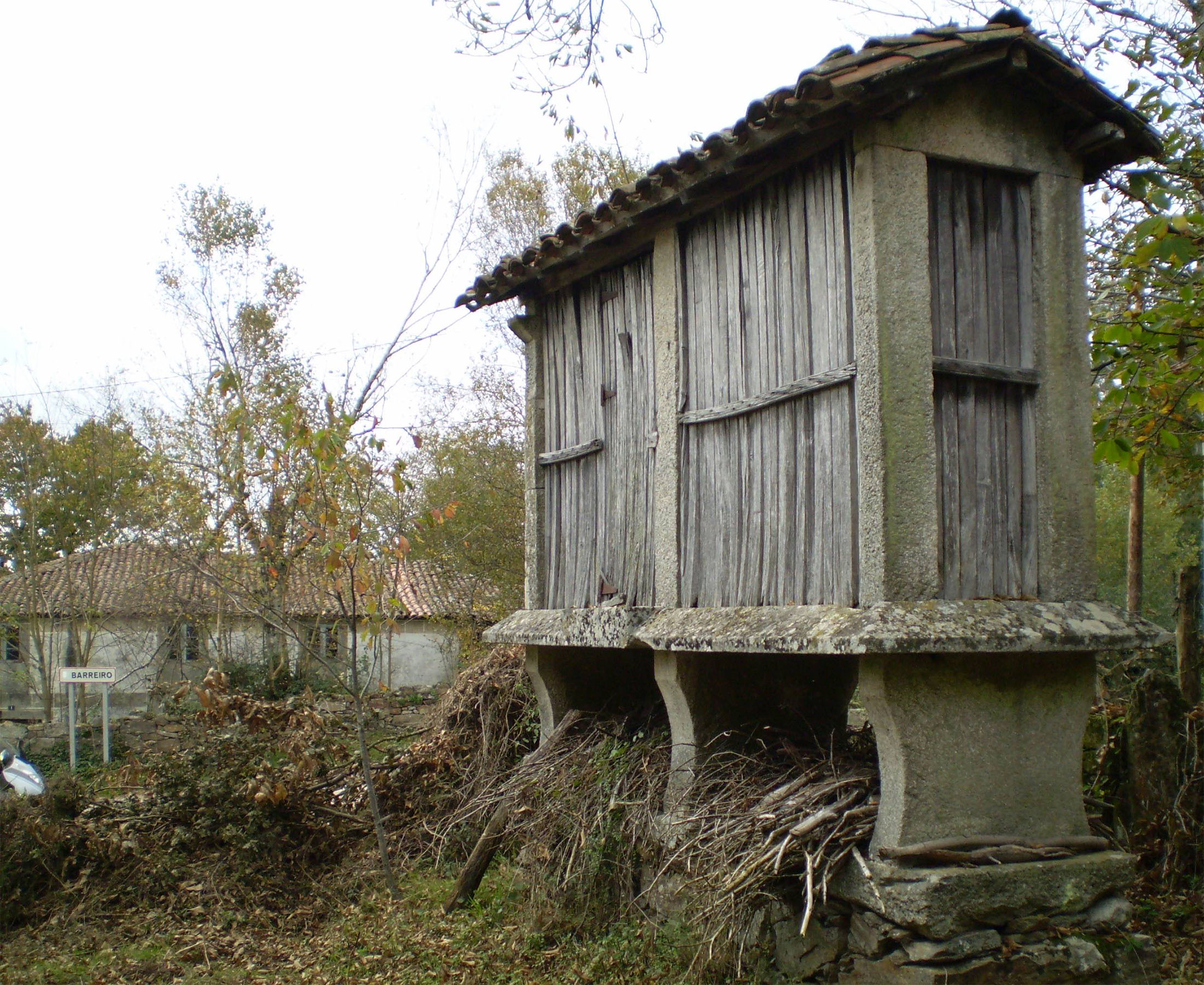 Hórreo de tipo mahía, con dous claros; sobre leve soleira e tres cepas de canteiría. Penais con madeira, e porta lateral. Cuberta de tella do país, non presenta adornos e ten unha anchura excepcionalmente máis pequena do habitual na zona. Ubícase no lugar da Pedrouza, parroquia de Barreiro (Antas de Ulla)